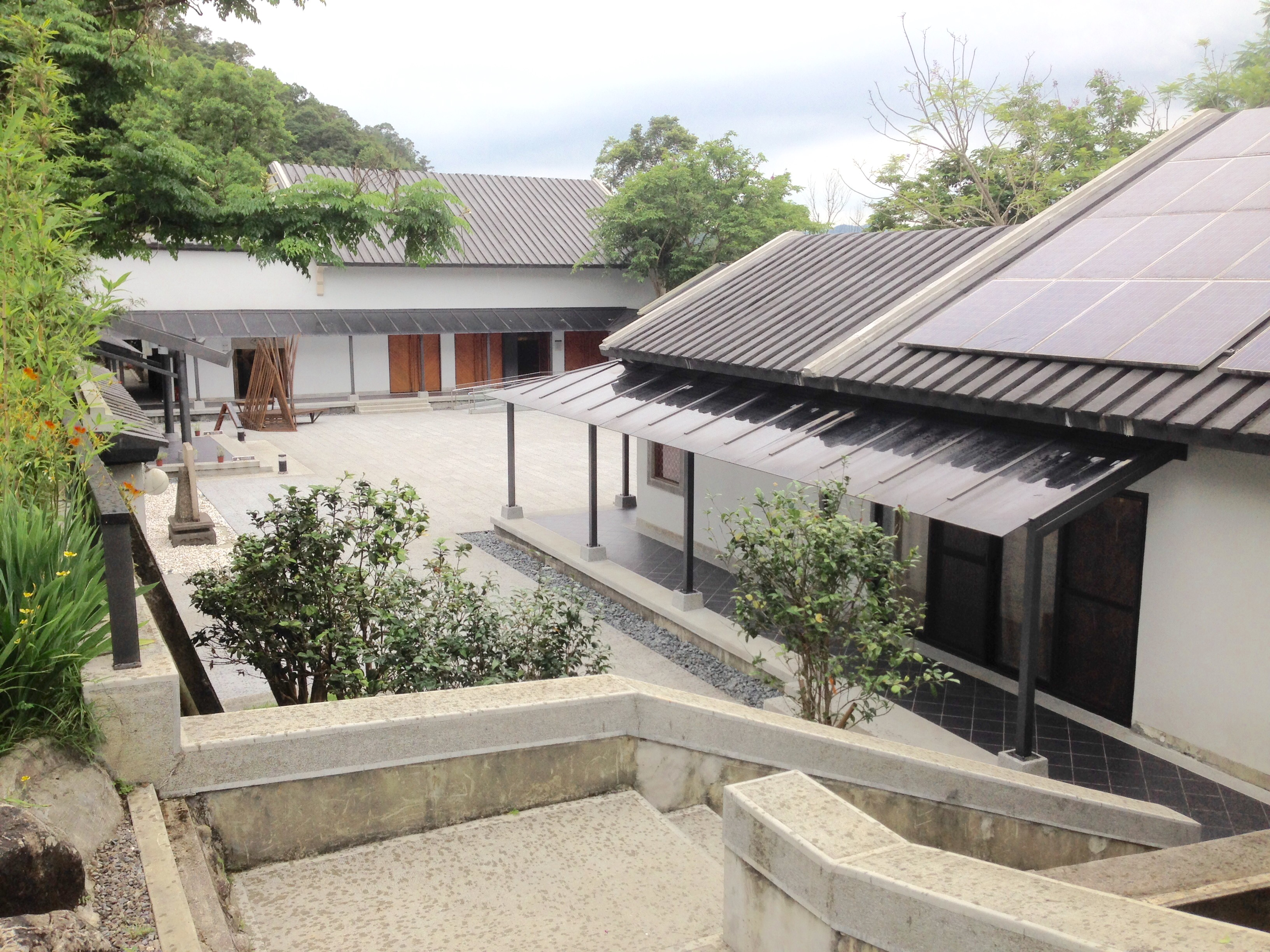 中文（台灣）: 坪林茶業博物館一景